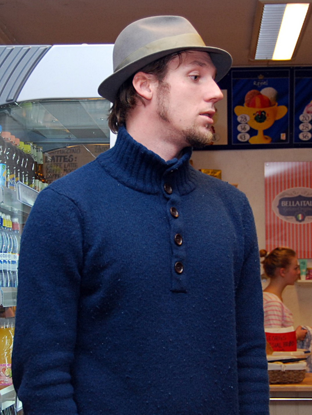 Rapperen Skranglebein (Per Olav Hoff Mydske) fotografert under en tilstelning på Platebaren i Grimstad i forbindelse med "Læringsdagene 2010" i Aust-Agder.